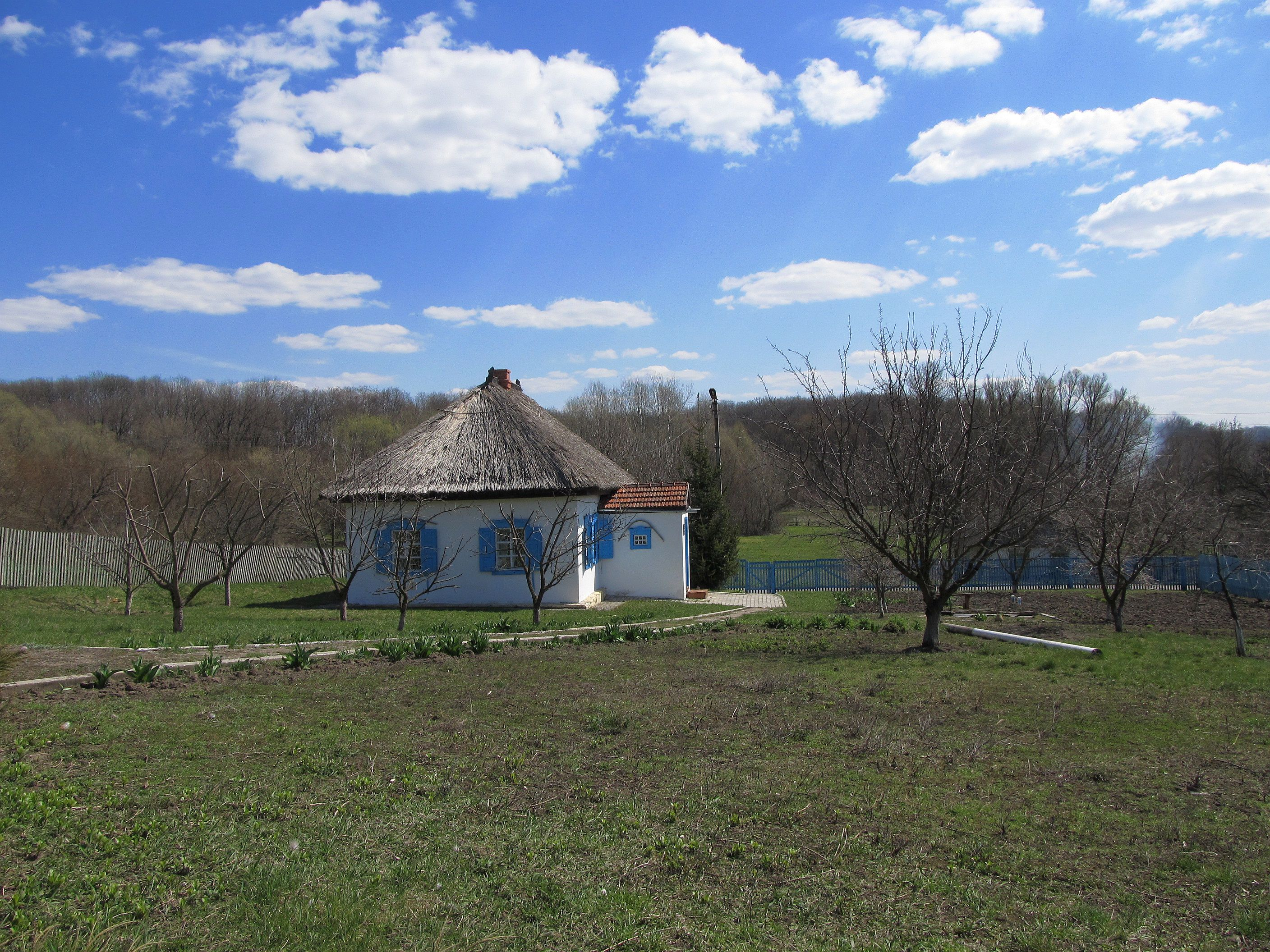 Місце садиби, в якій провів дитячі та юнацькі роки О.Т.Гончар (1918–1995 рр.)., Суха с.